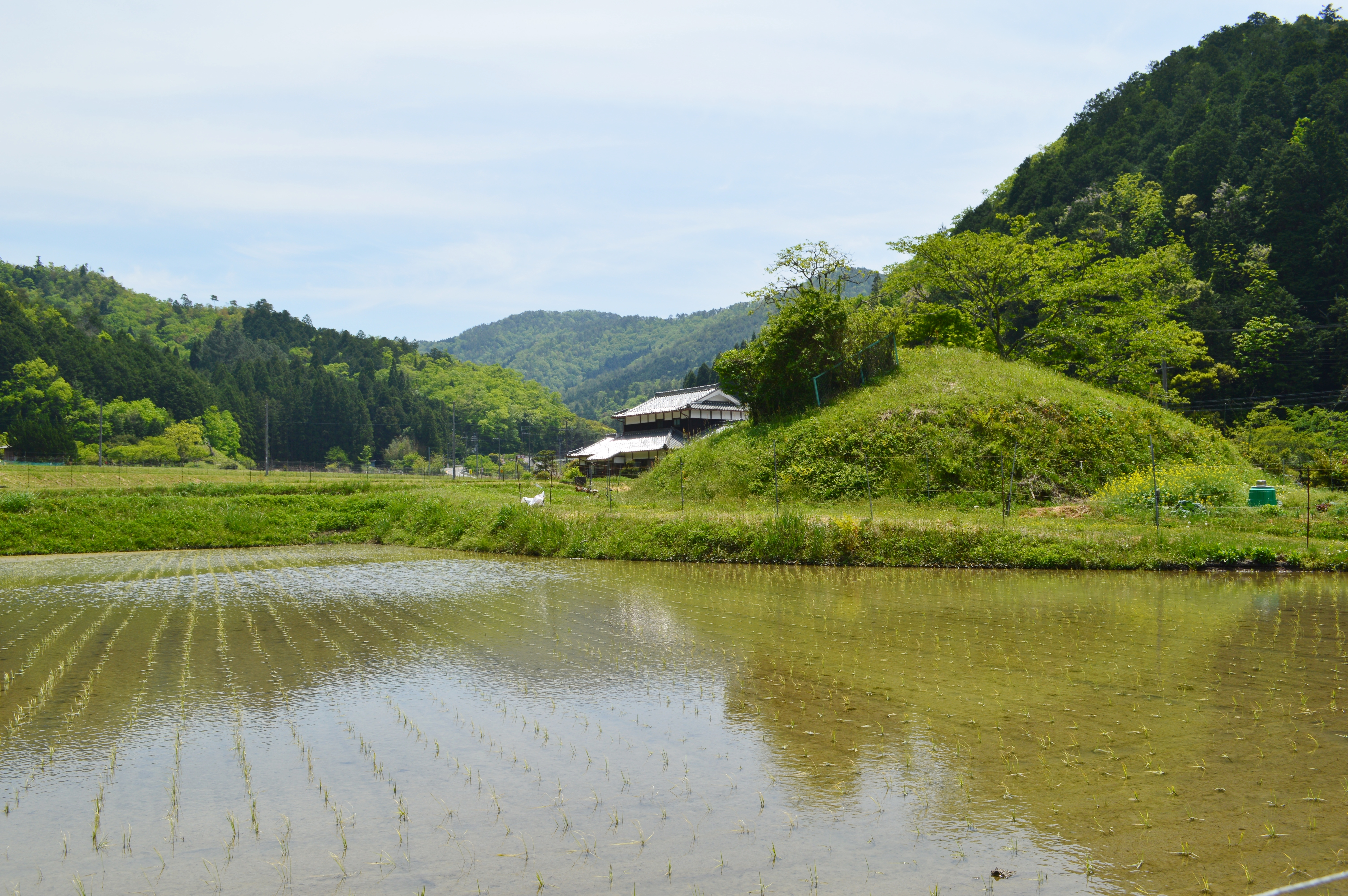 洞中1号墳・洞中2号墳 Nikon D3200